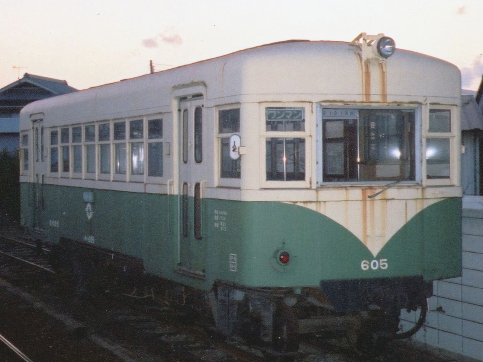 紀州鉄道 キハ605 紀伊御坊駅にて 岡山臨港鉄道キハ1003を譲り受けた車両